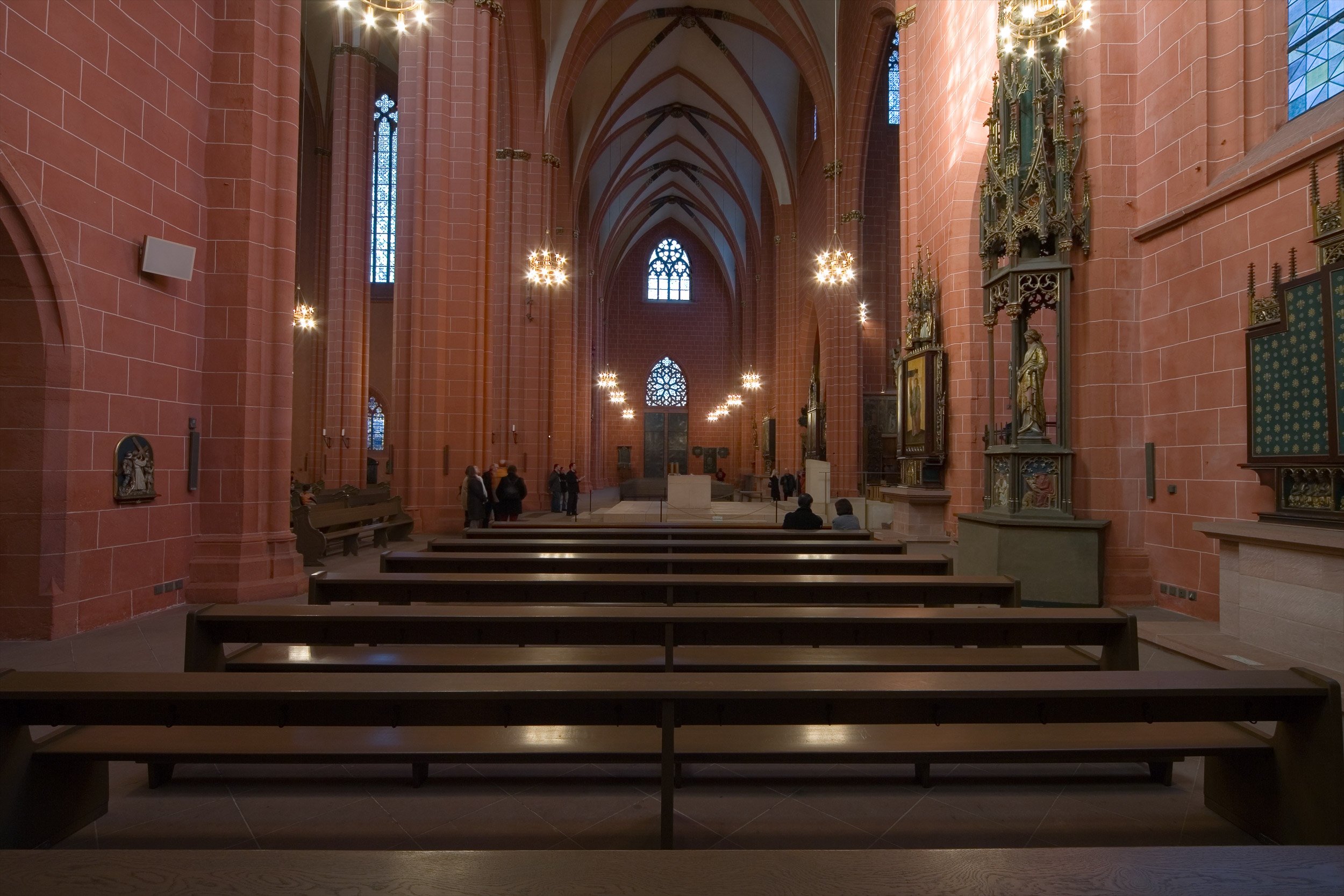 Blick ins Querhaus von Süden nach Norden im Kaiserdom St. Bartholomäus in Frankfurt am Main. Selber fotografiert im Februar 2008, Doppellizensierung GFDL & CC-BY-SA 2.5.